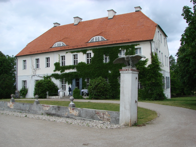 Das Gutshaus Geisendorf ist ein Kulturforum am Rande des Tagebaus Welzow-Süd.